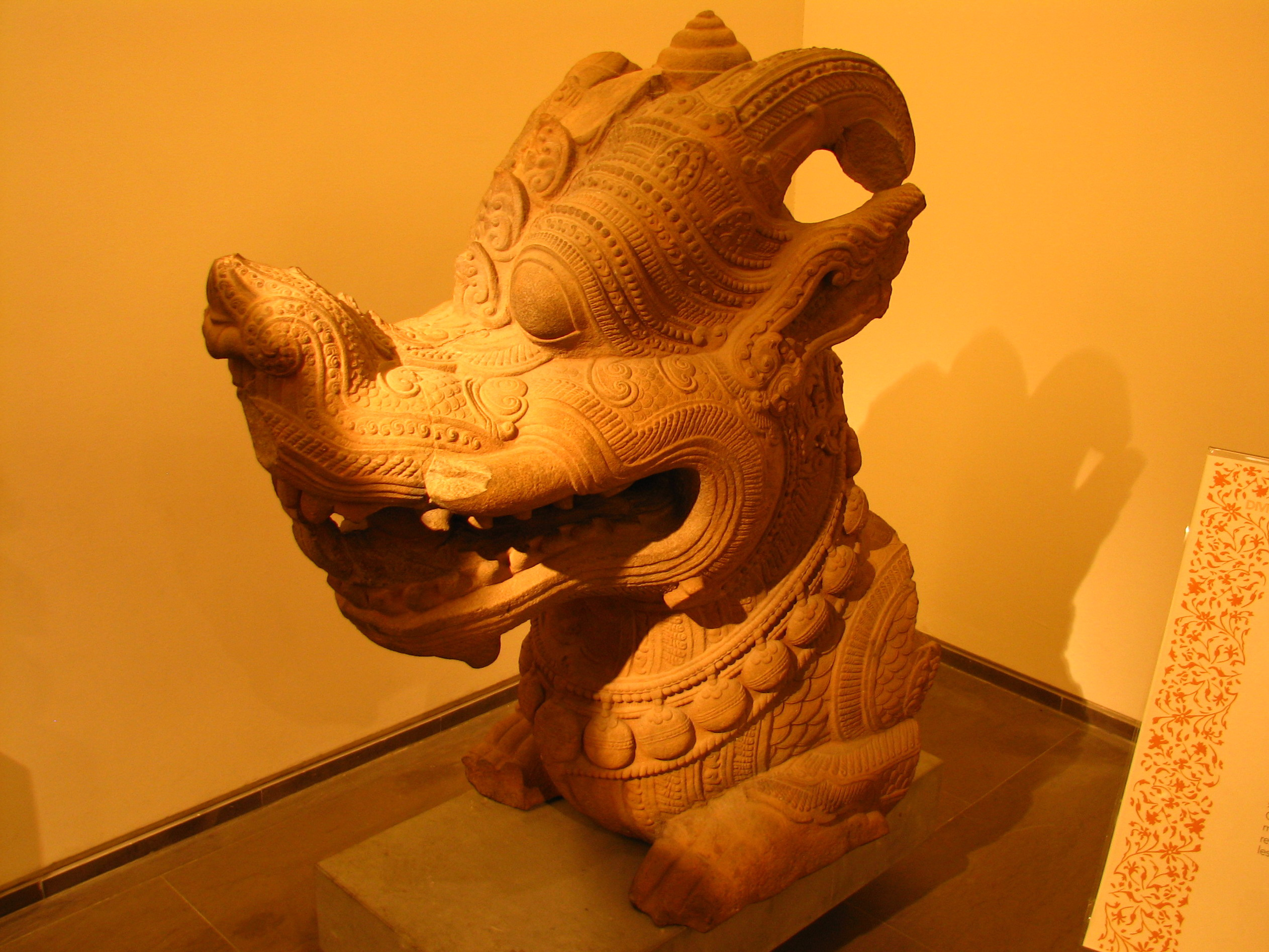 Elément d'échiffre (Dragon-makara), Thap Mam, Vietnam. Propriété du musée Guimet, Paris, France.